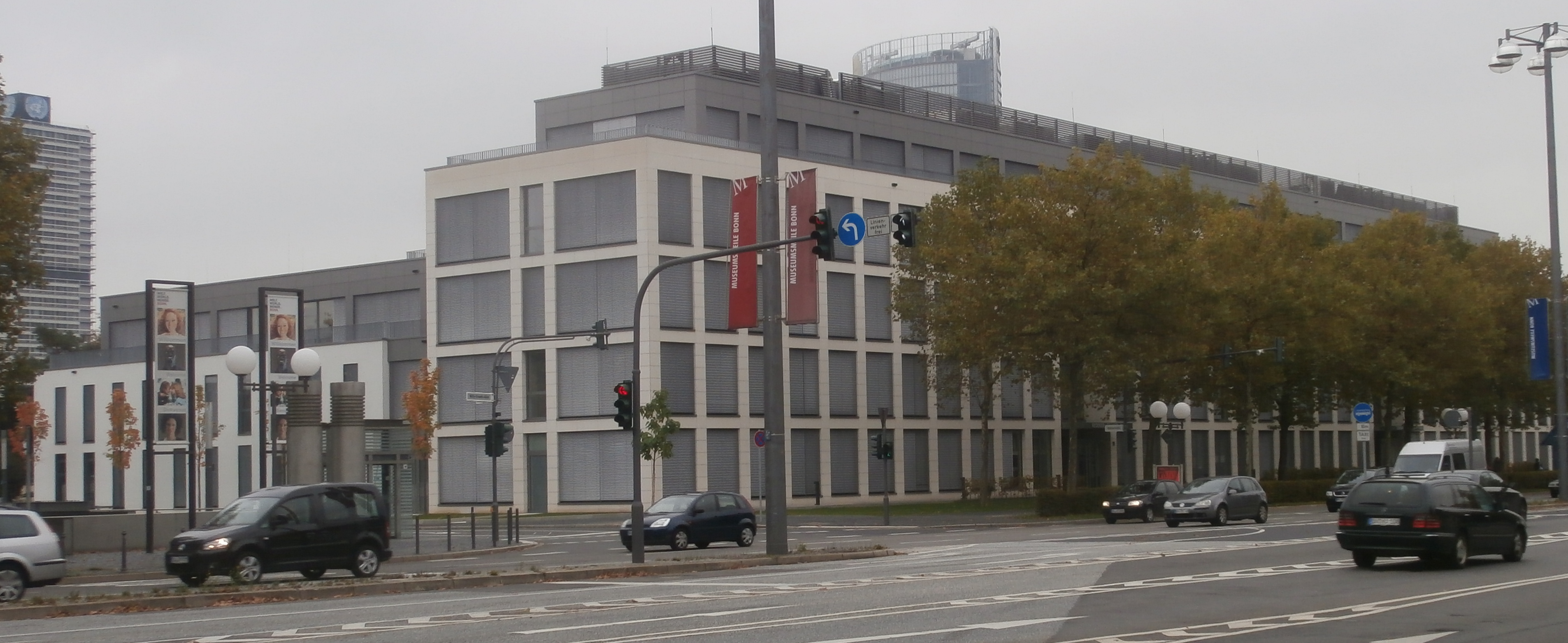 Bürogebäude Brandtelf (Nachfolgebau der Landesvertretung Baden-Württemberg)